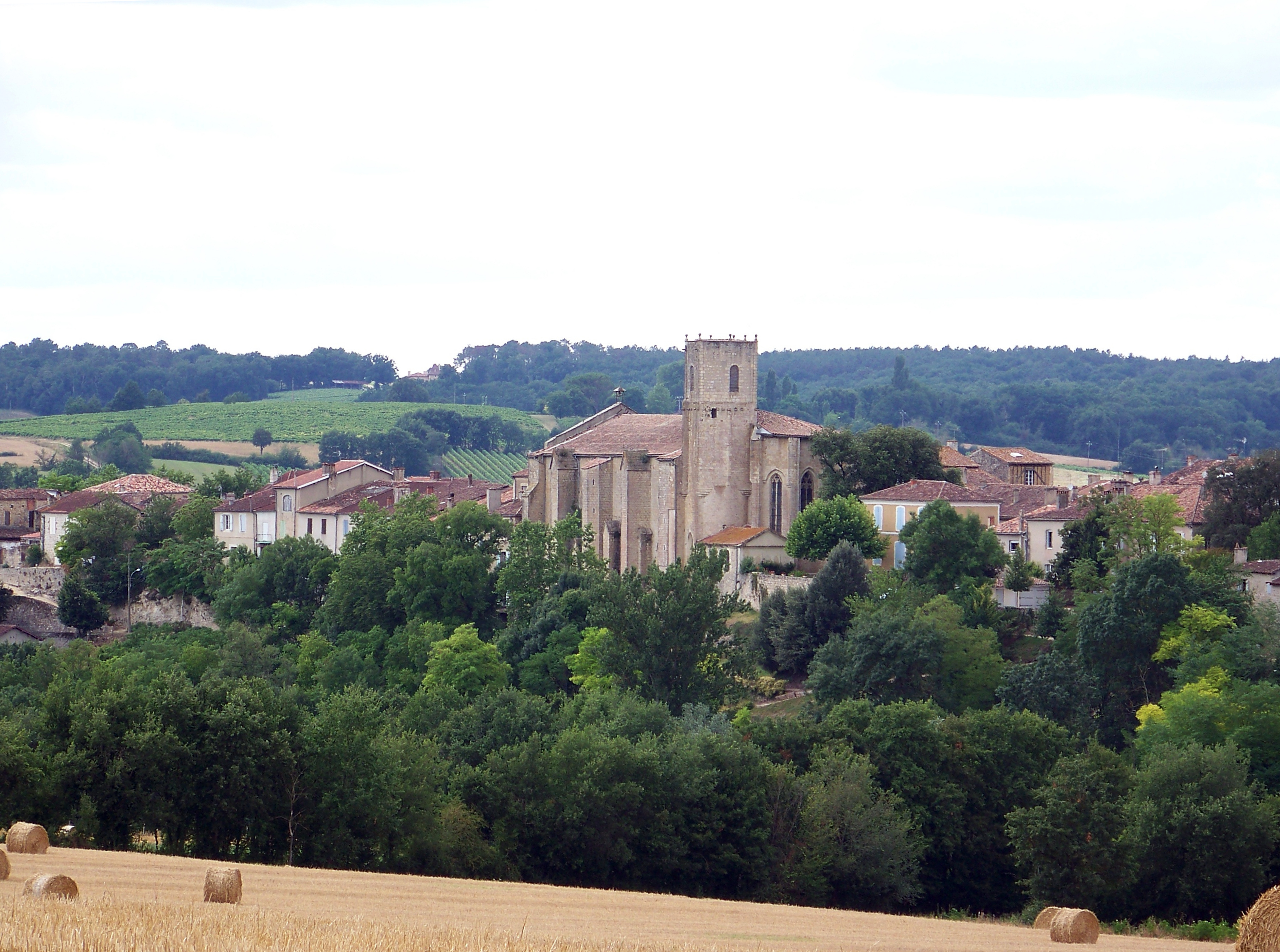 Montréal-du-Gers, le village et l'église Sainte-Marie, vus depuis la route de Genens